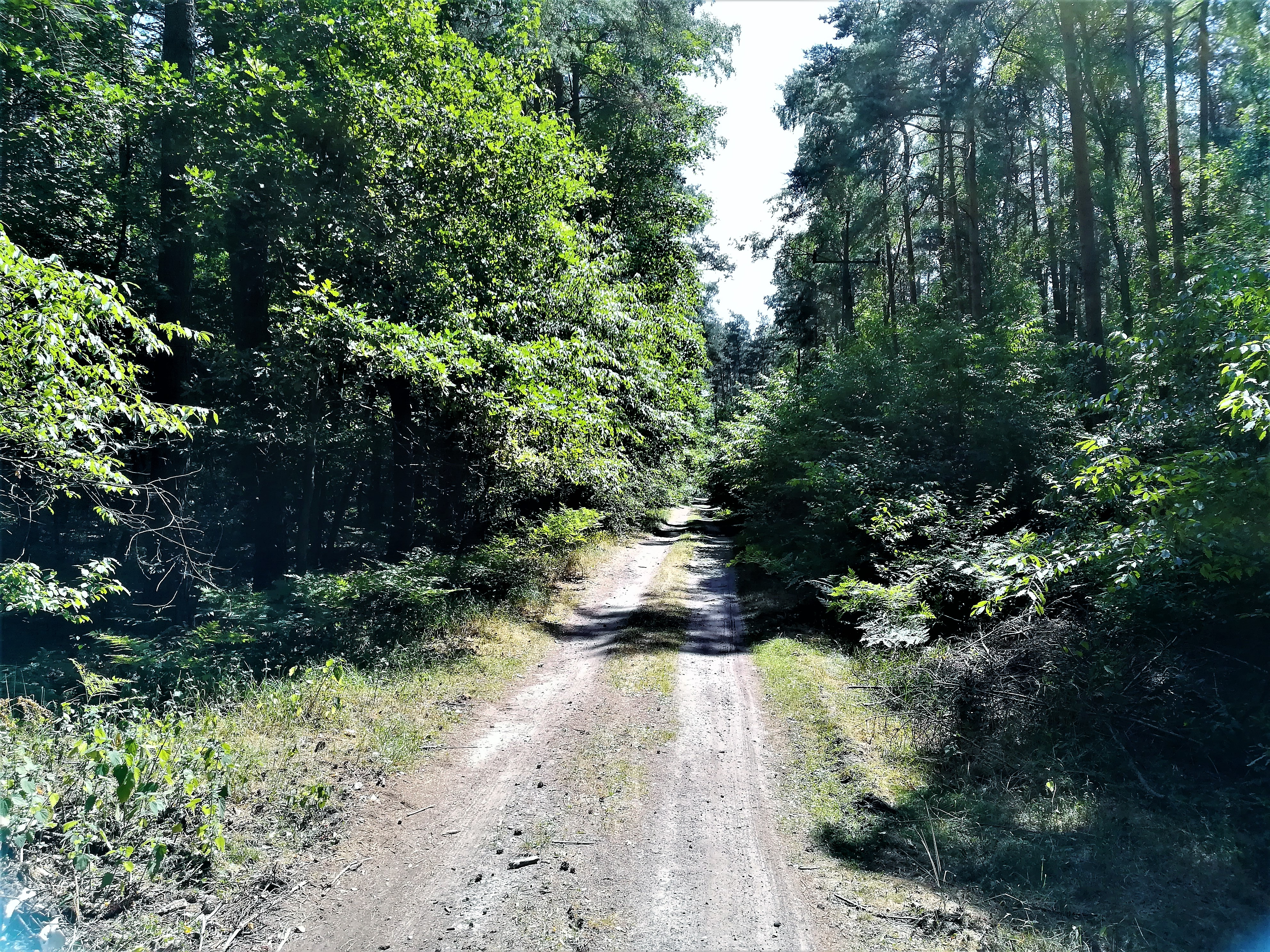 Puszcza Goleniowska - przyroda w okolicy Klinisk.